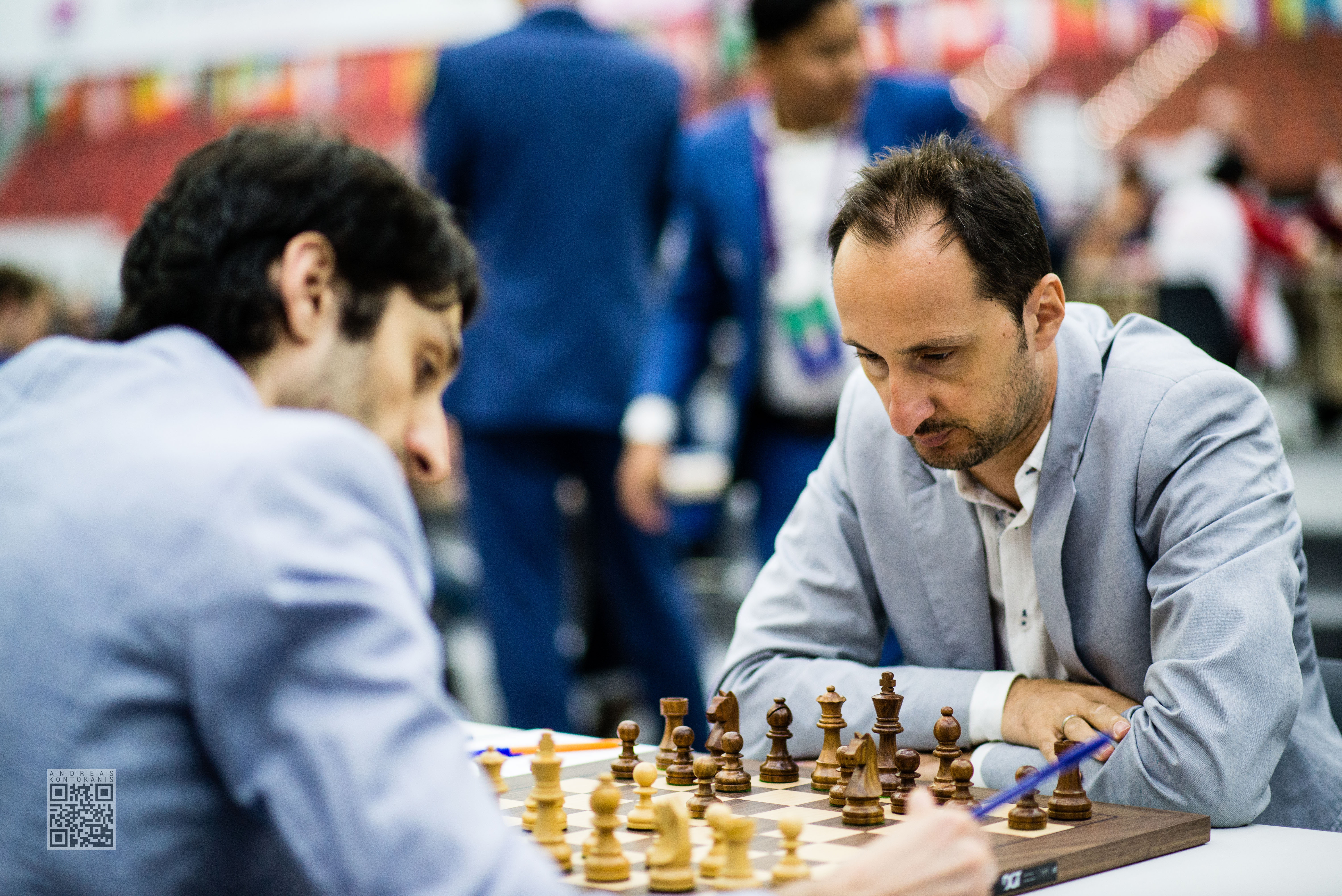 Topalov Veselin